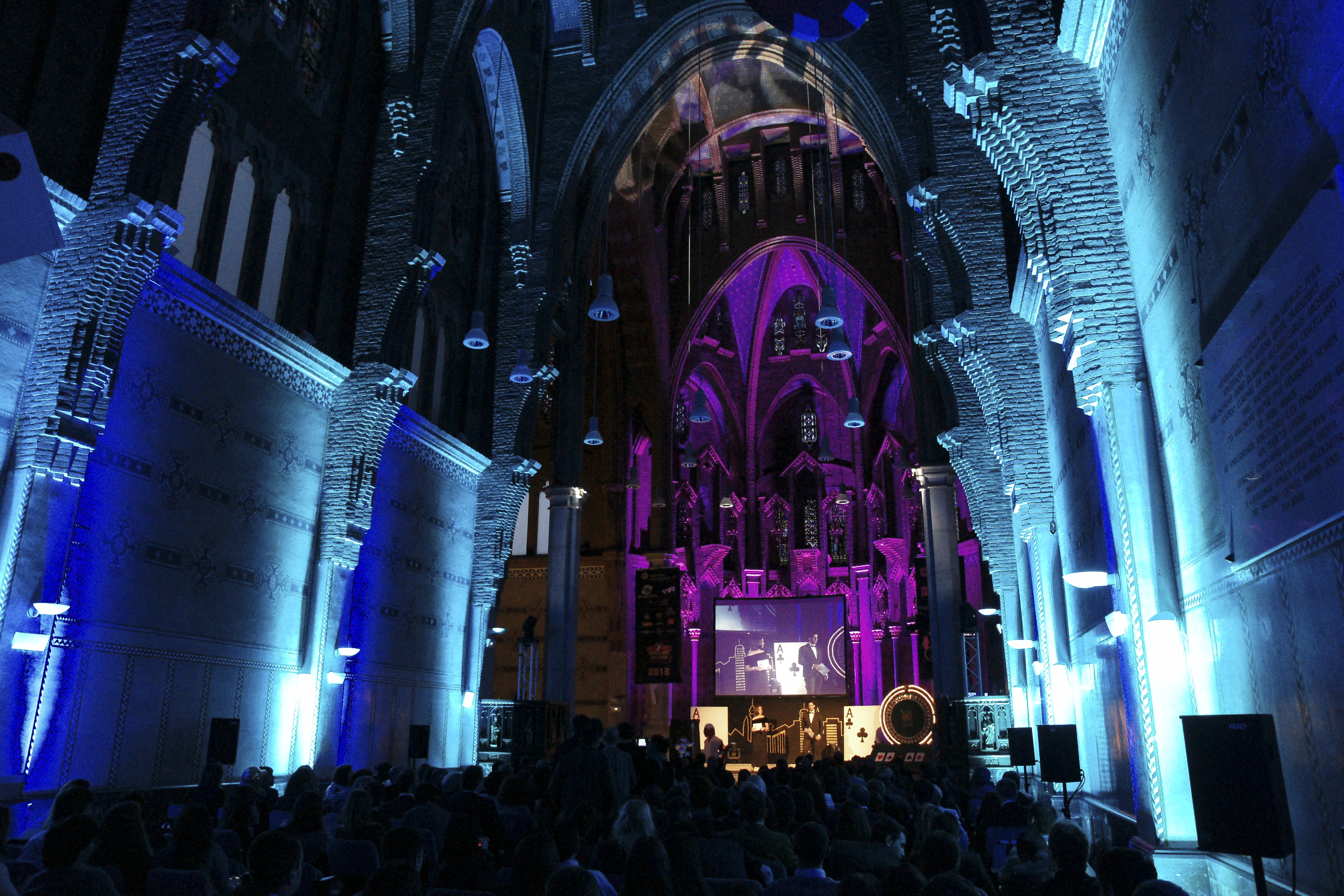 Aula Magna de la Universitat Abat Oliba CEU en la entrega de los premios GoliADs 2013